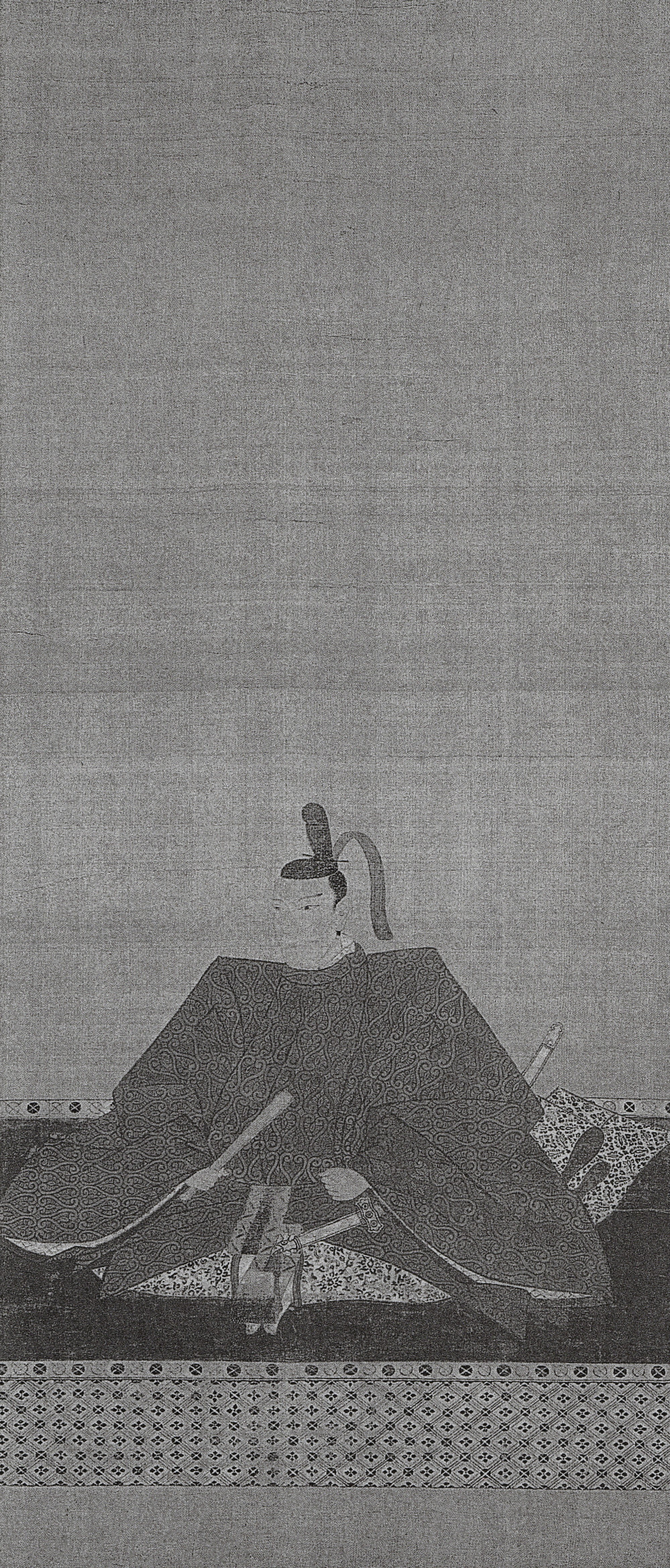 加納藩主奥平忠政の肖像(モノクロ)。